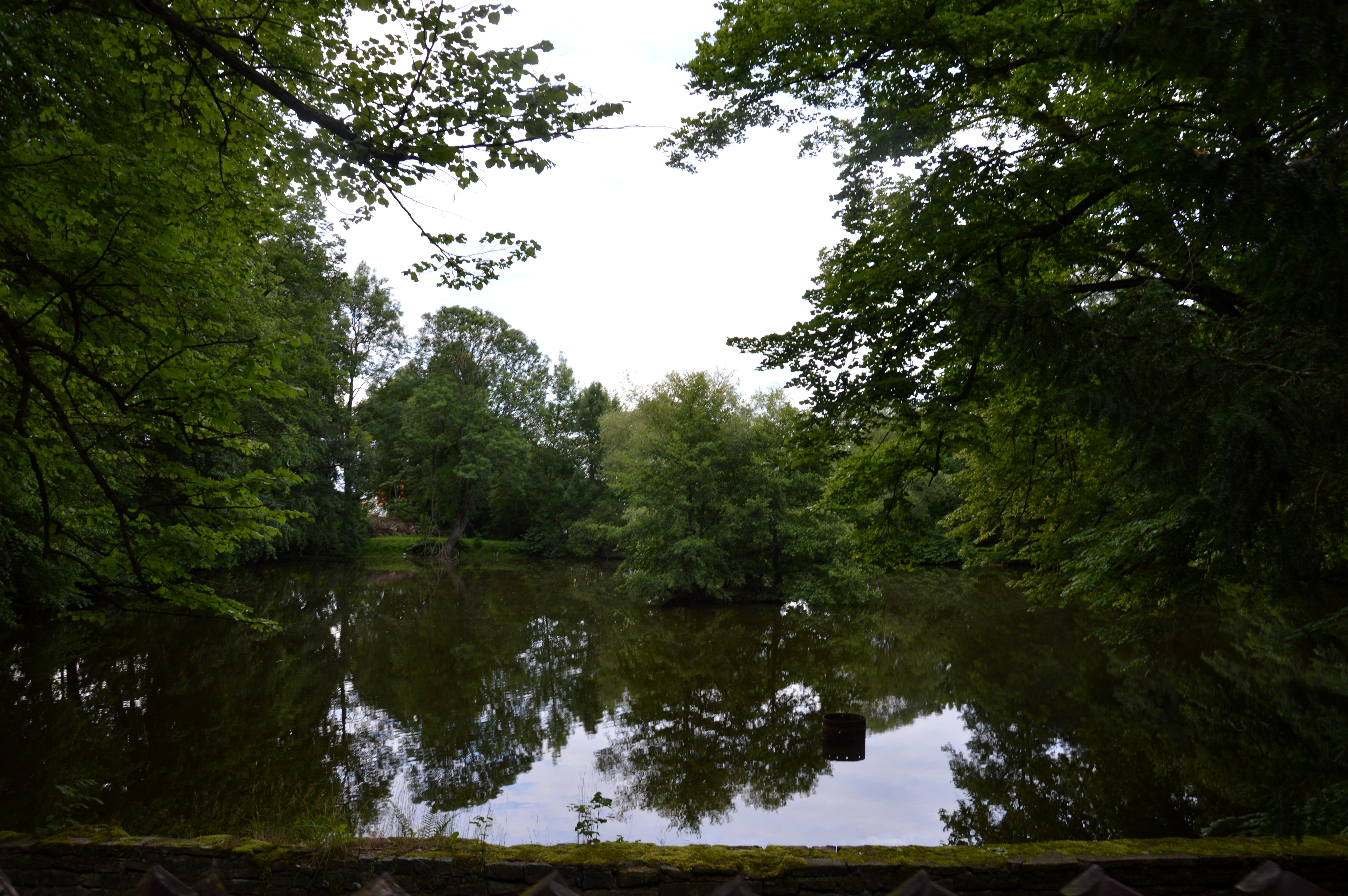 Neuer Teich Ballenstedt